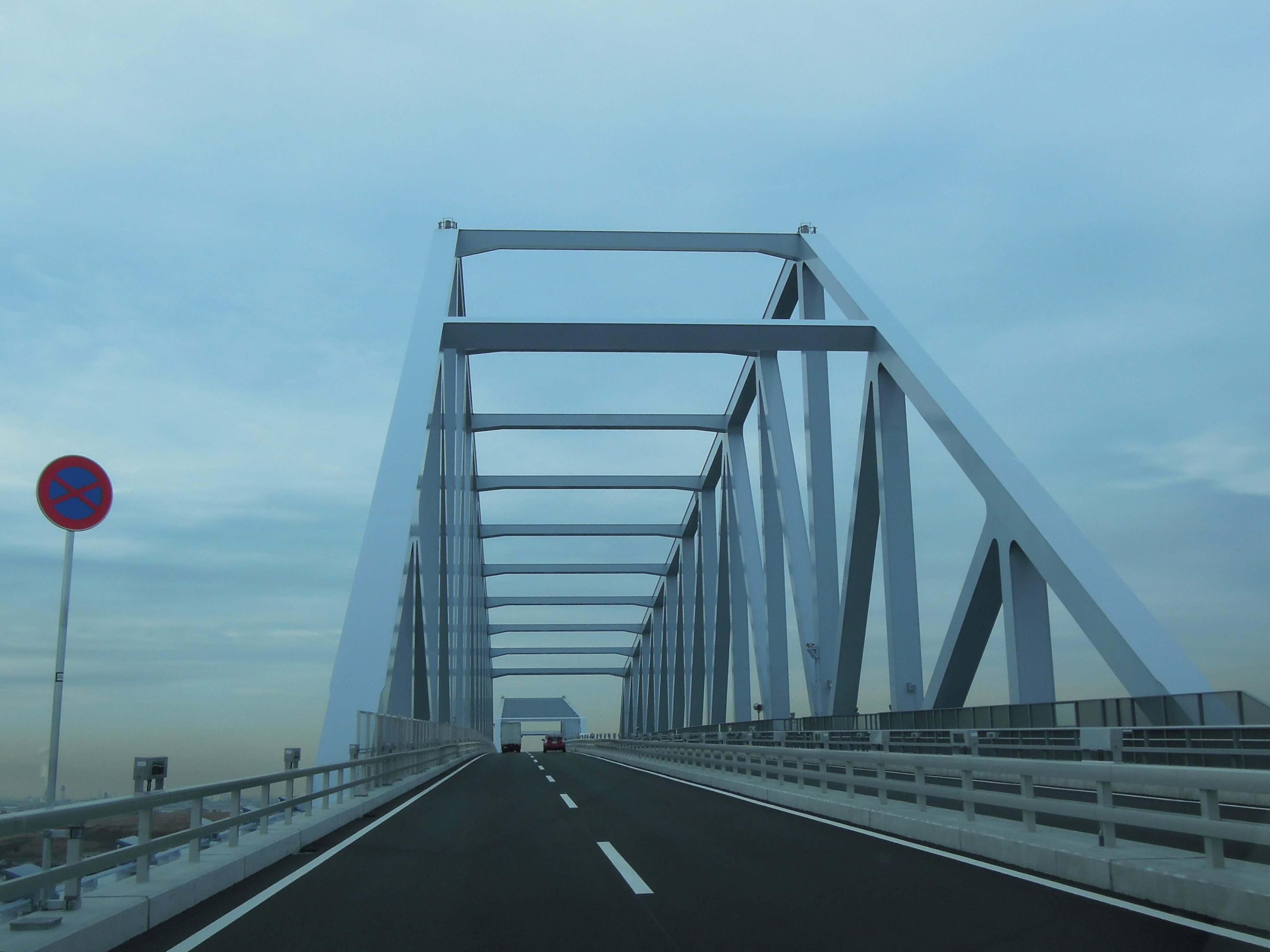 東京ゲートブリッジ。若洲より中央防波堤方面への道路上より